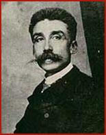 Retrato de Pedro Américo.